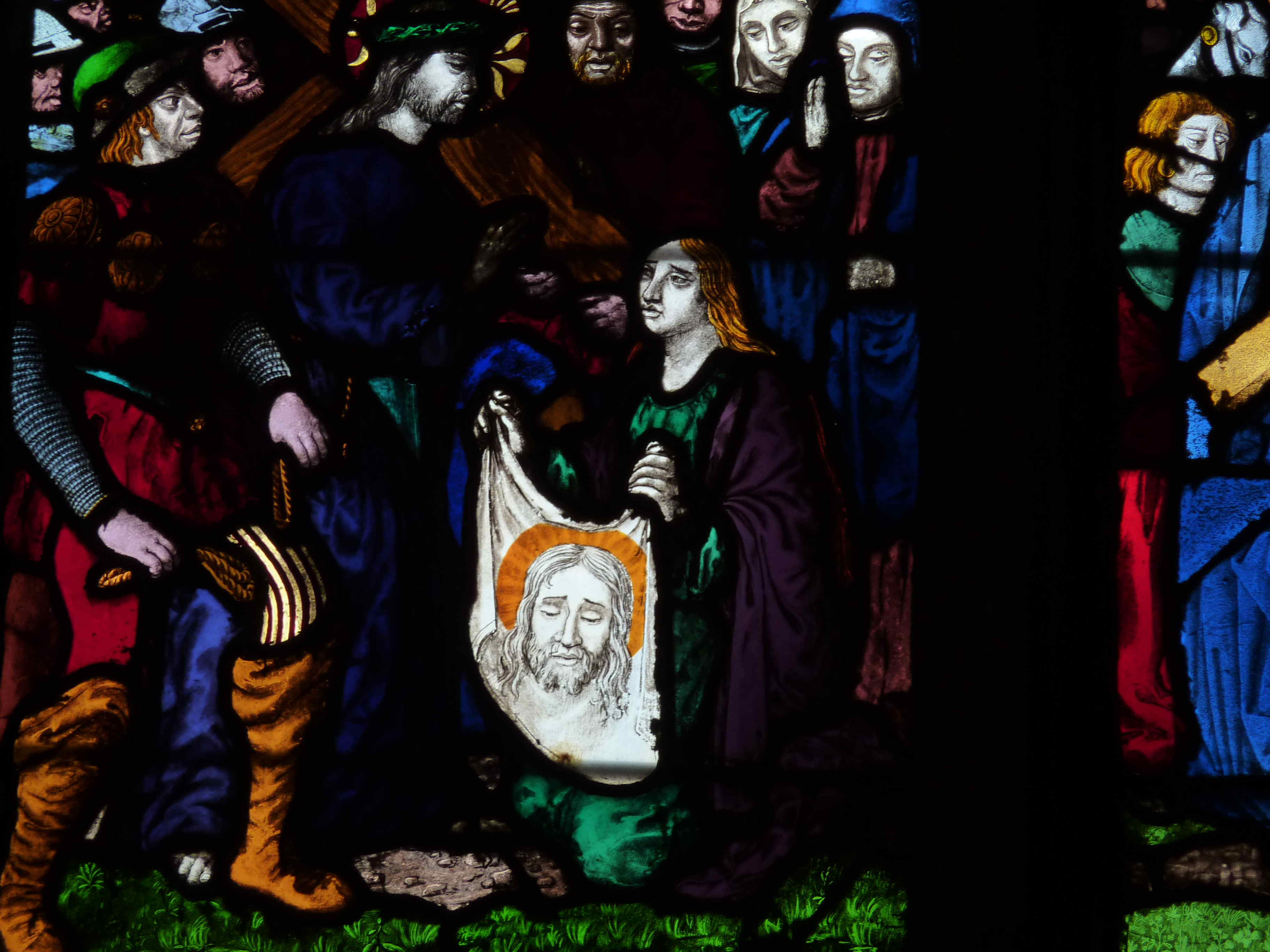 Katholische Kirche Saint-Pierre in Dreux im Département Eure-et-Loir (Centre-Val de Loire/Frankreich), Bleiglasfenster (baie 2) aus dem frühen 16. Jahrhundert im Chor; Darstellung: Passion; Ausschnitt unten links: Schweißtuch der Veronika